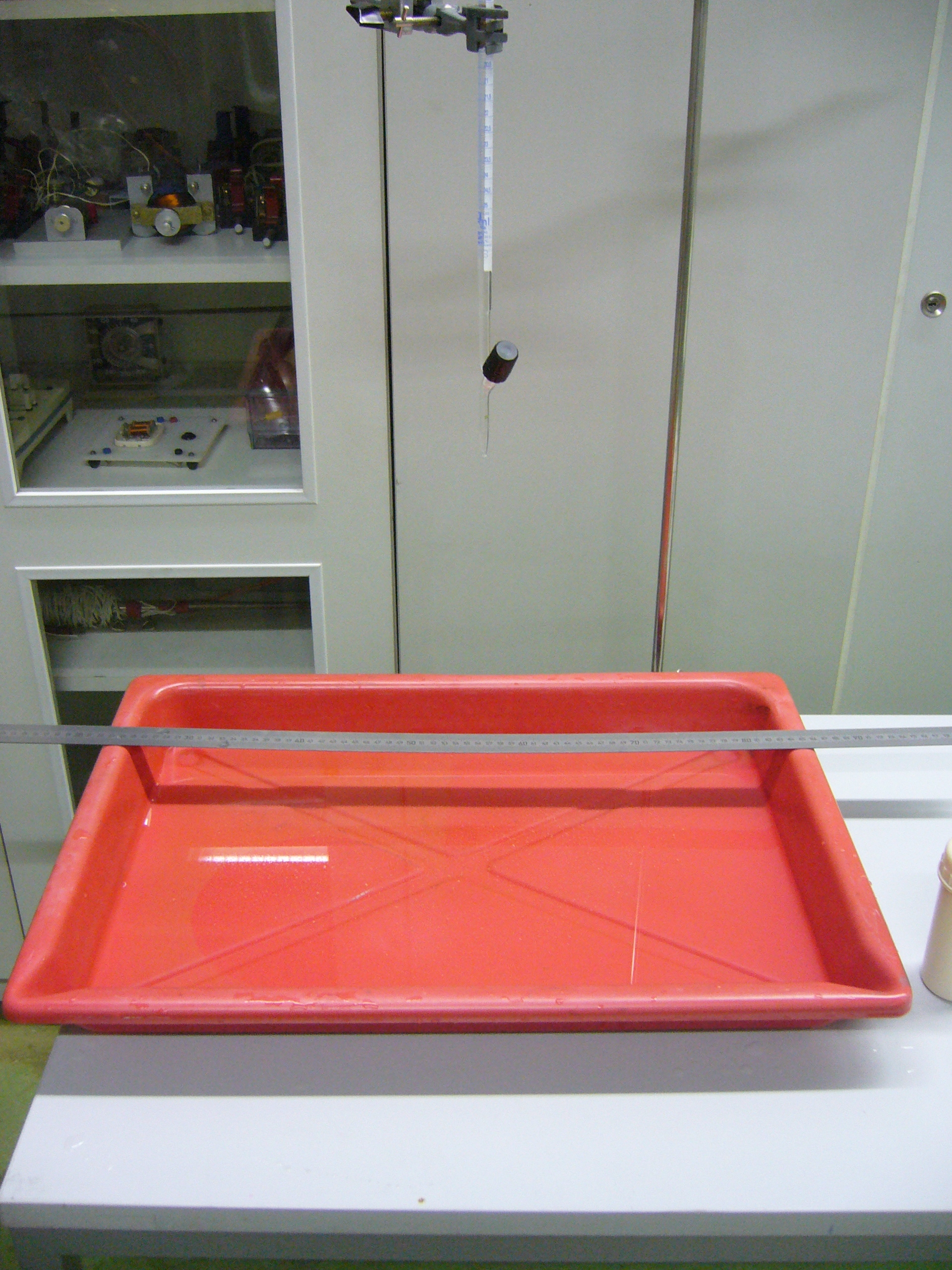 Ölfleckversuch, Gesamtabbildung der Versuchsanordnung